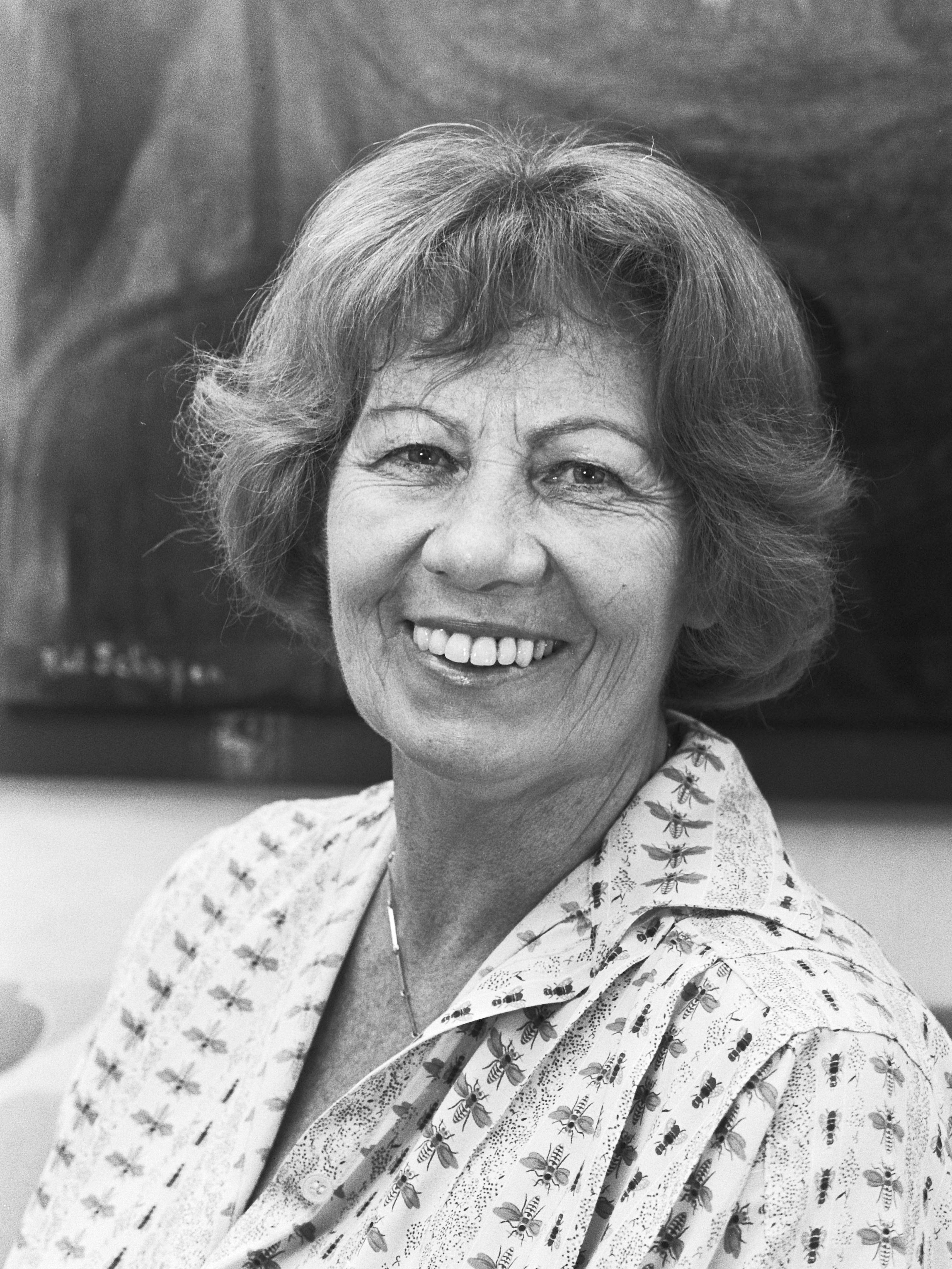 Actrice Riek Schagen 65 jaar 13 november 1978